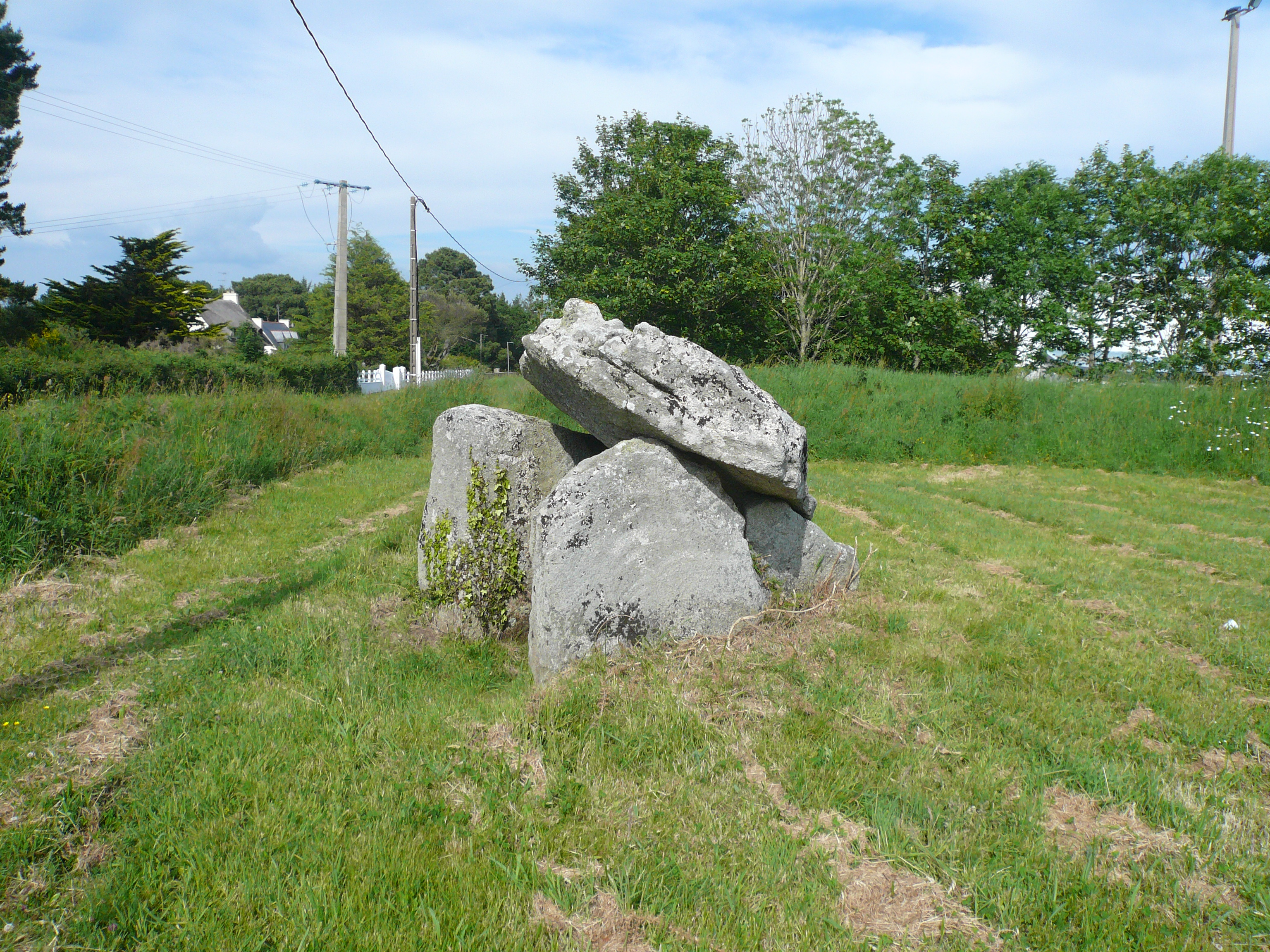 Vue de profil du dolmen de Kervignon, commune de Plobannalec-Lesconil, Finistère, Bretagne, France.